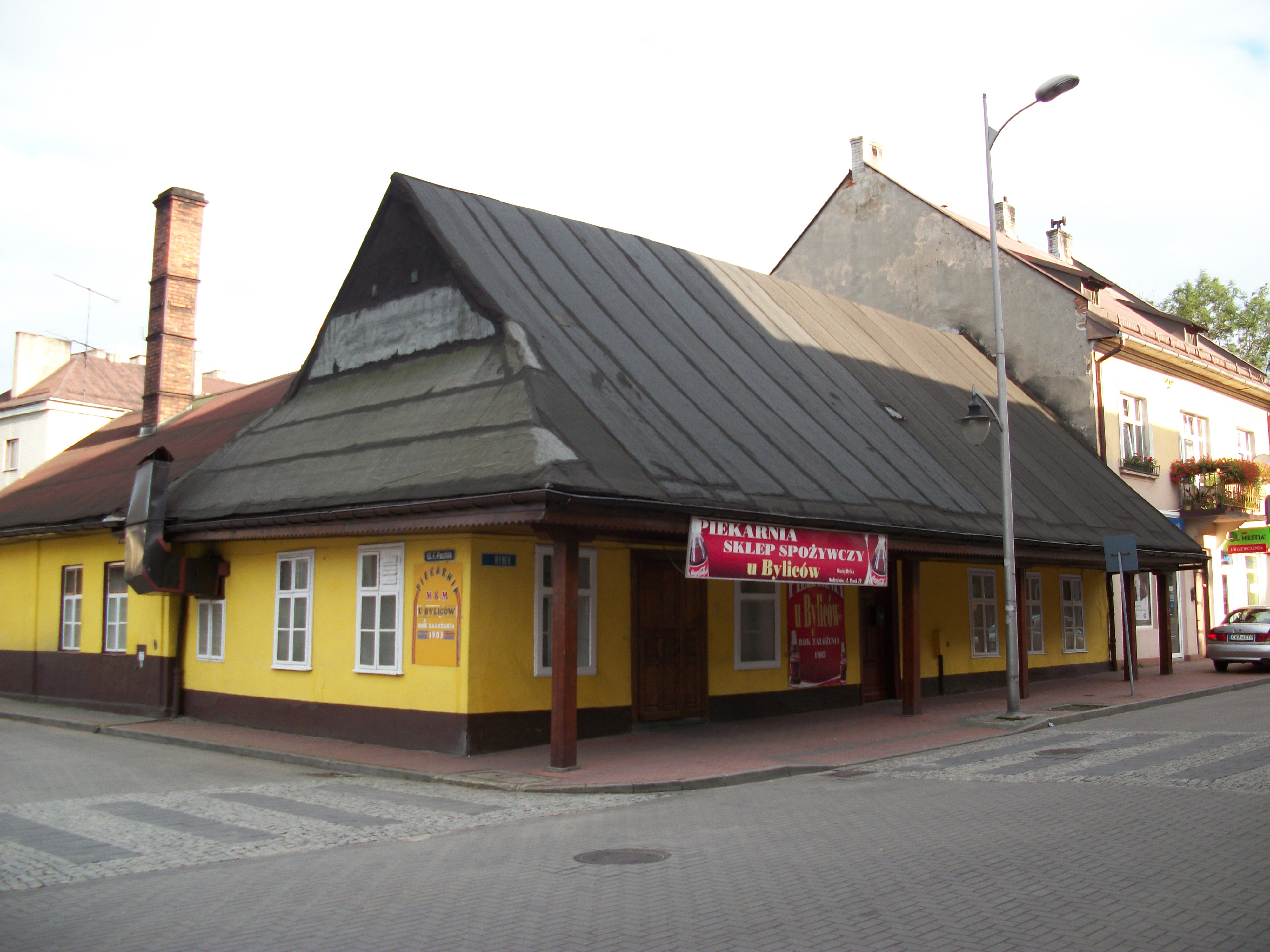 Drewniany dom podcieniowy w Andrychowie. Jeden z ostatnich, zachowanych z tradycyjnej zabudowy miasta.